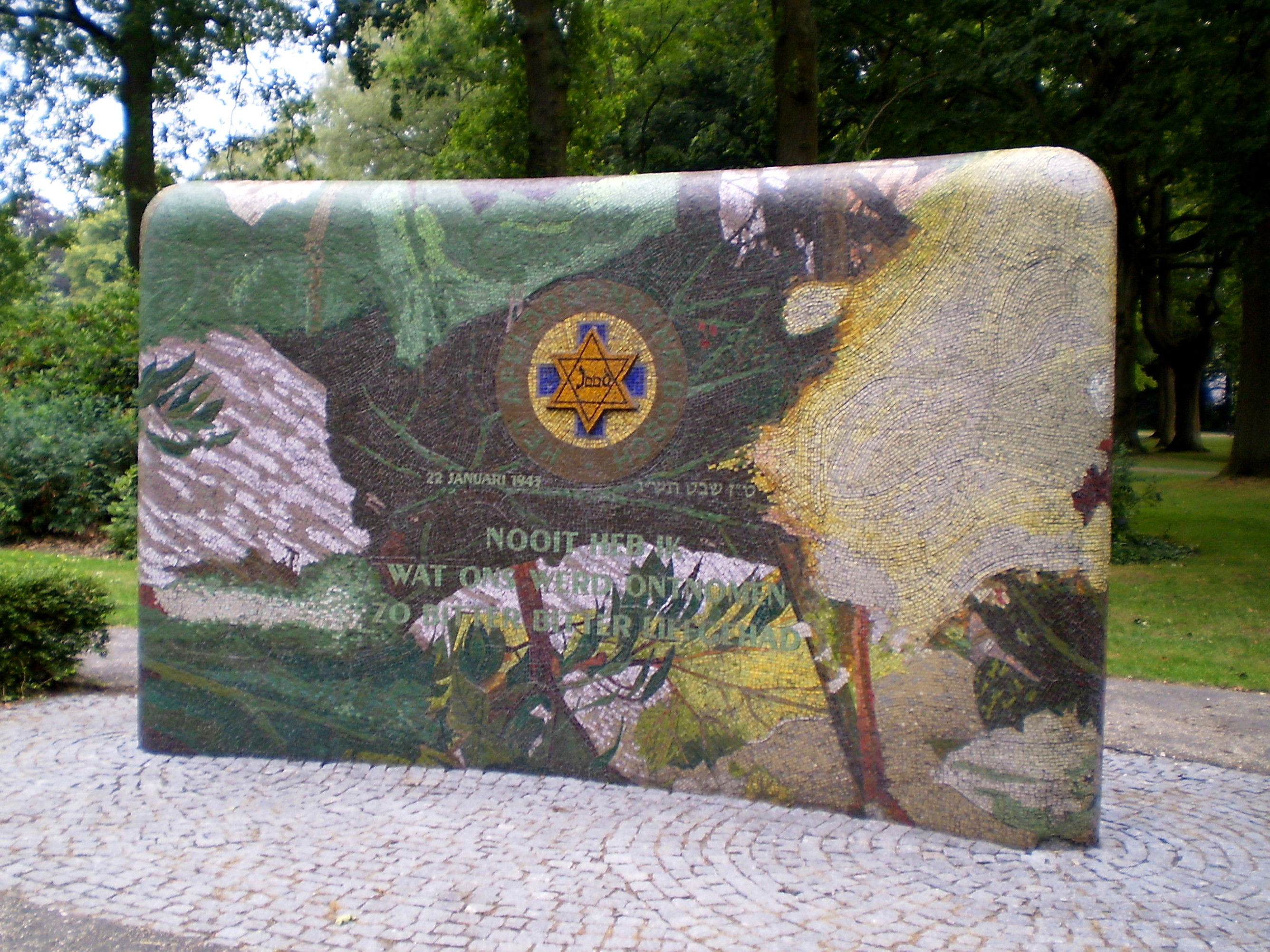 Monument Apeldoornsche Bosch, Prinsenpark, Apeldoorn